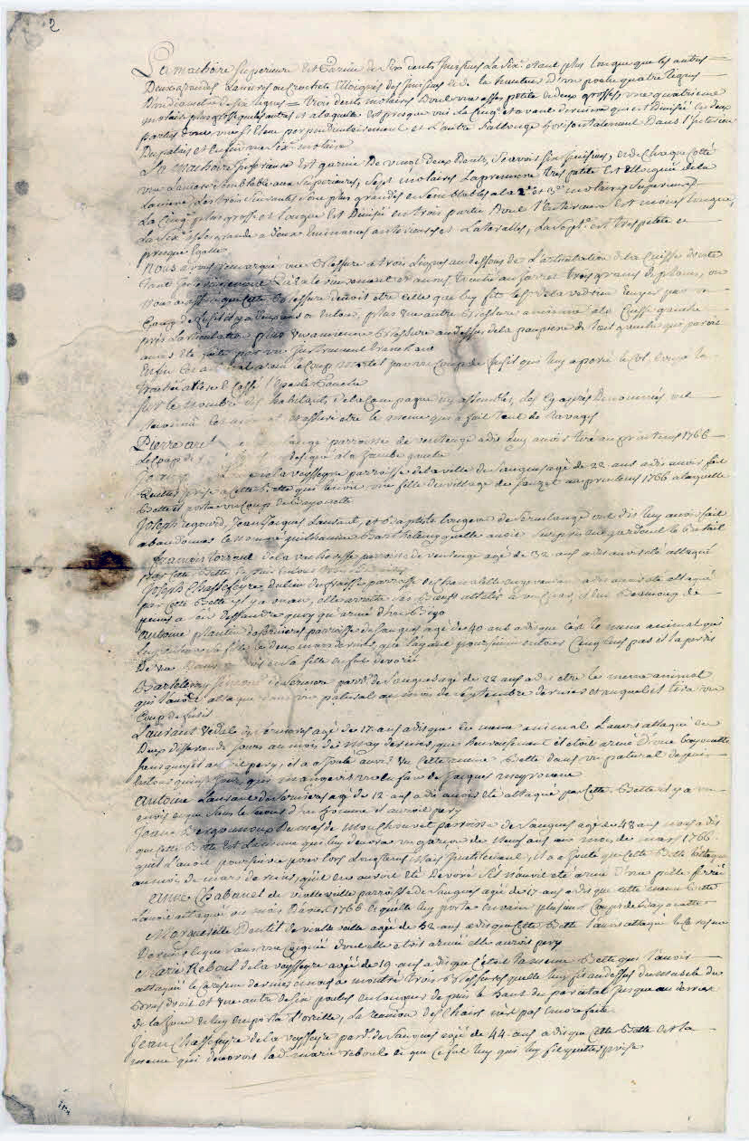 Procès verbal d’examen du corps de la “bête du Gévaudan” adressé à l’intendant d'Auvergne le 20 juin 1767, page 2